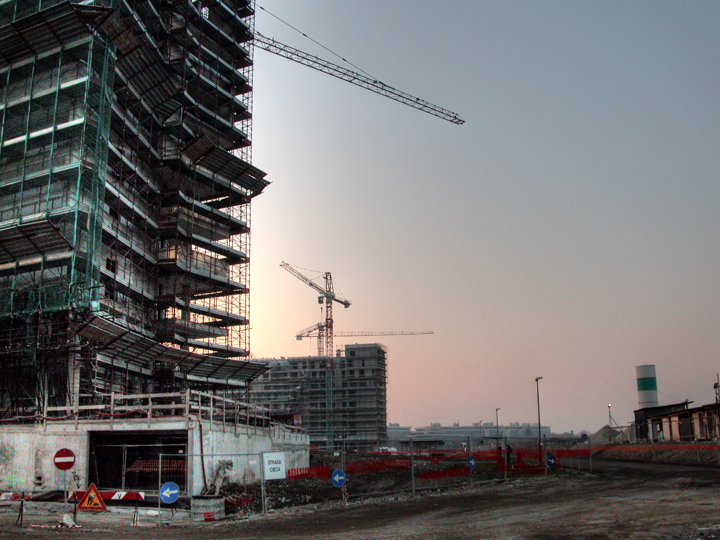 Milan, Santa Giulia area building yard